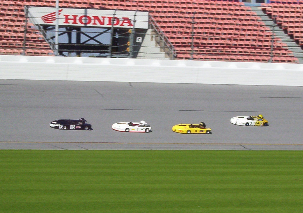 Laydown enduro